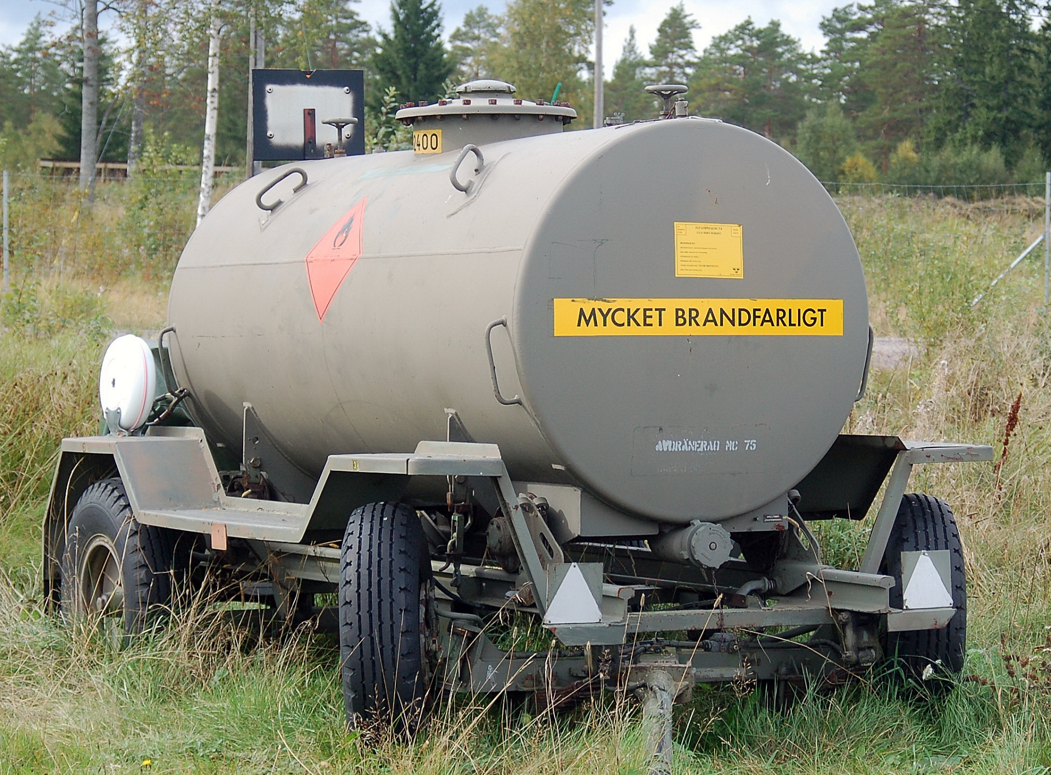 Flygvapnets rulltank för flygbränsle, volym 2000 liter